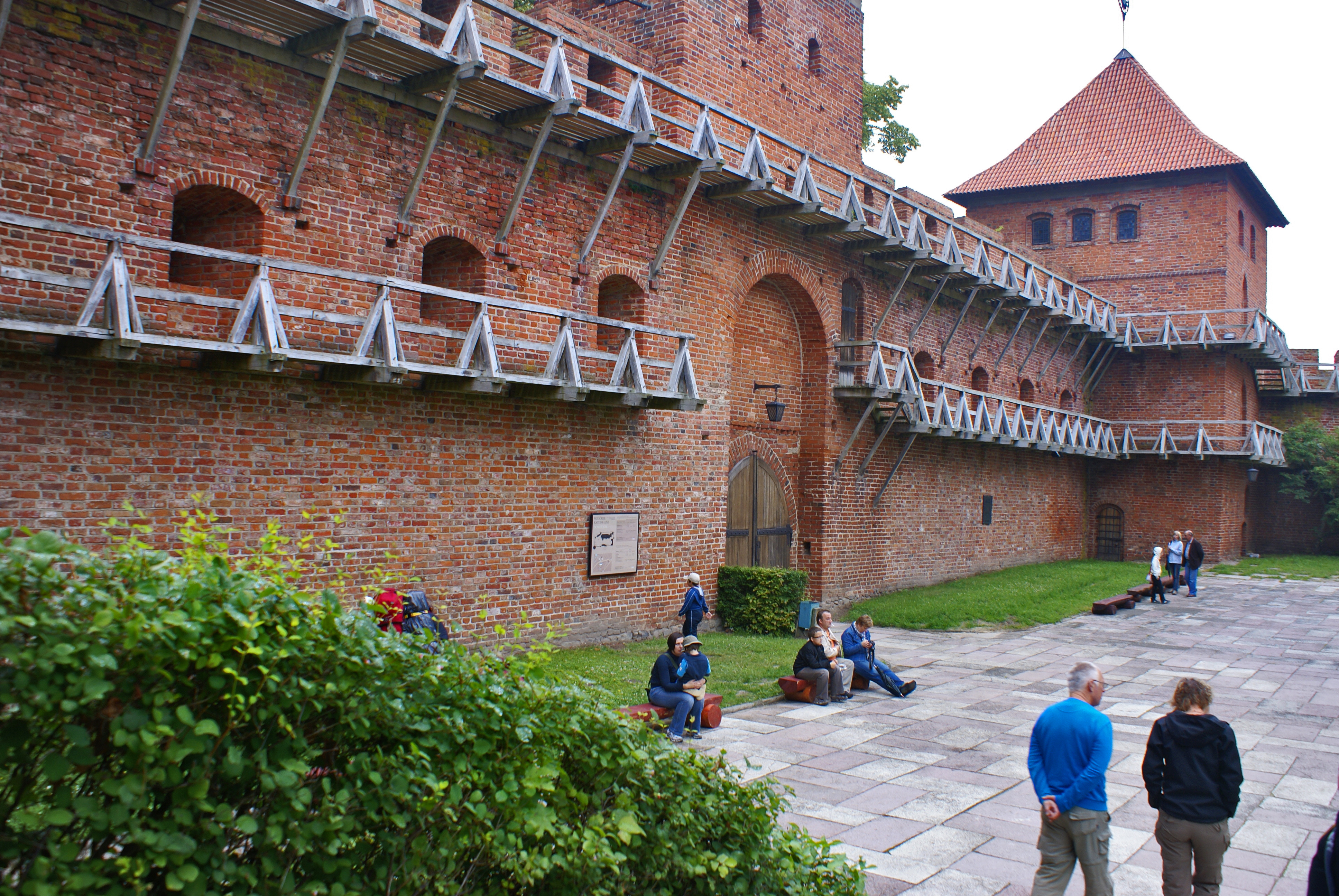 brama zachodnia w zespole Wzgórza Katedralnego oraz wieża Kopernika w zespole Wzgórza Katedralnego (F/3 z 15.10.1958)